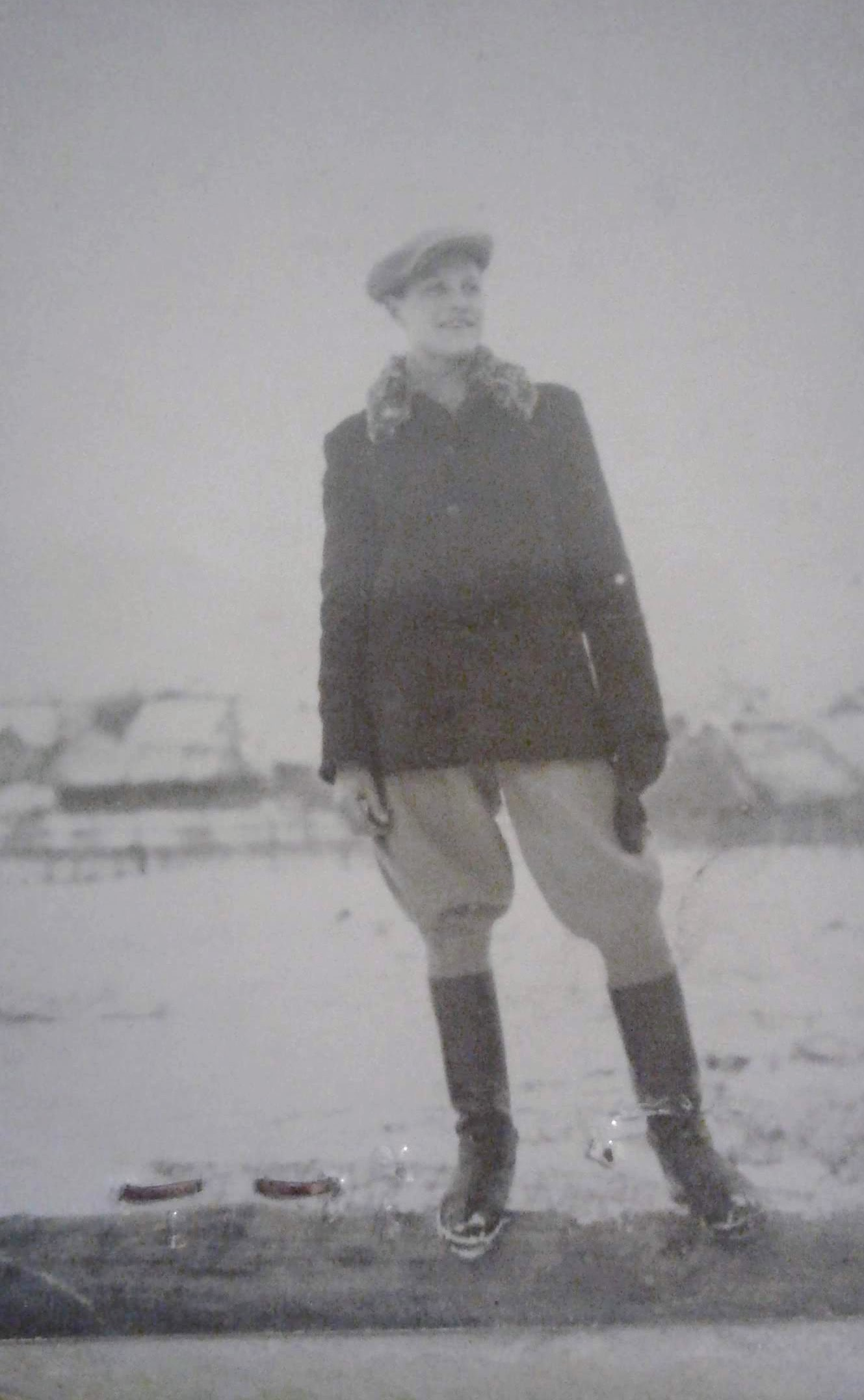 Jerzy Wojtowicz - przed majątkiem dziadka Józefa